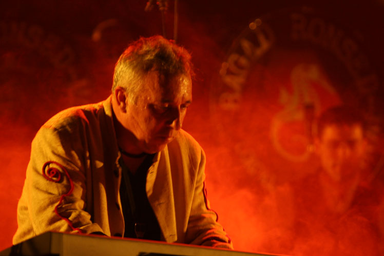 Photo libre de droit de Pascal Lamour, prise par Myriam Jégat à Locoal Mendon (56) le 13 mai 2005. Je confirme que cette photo est libre de droit. En cas de questions veuillez me contacter sur le site